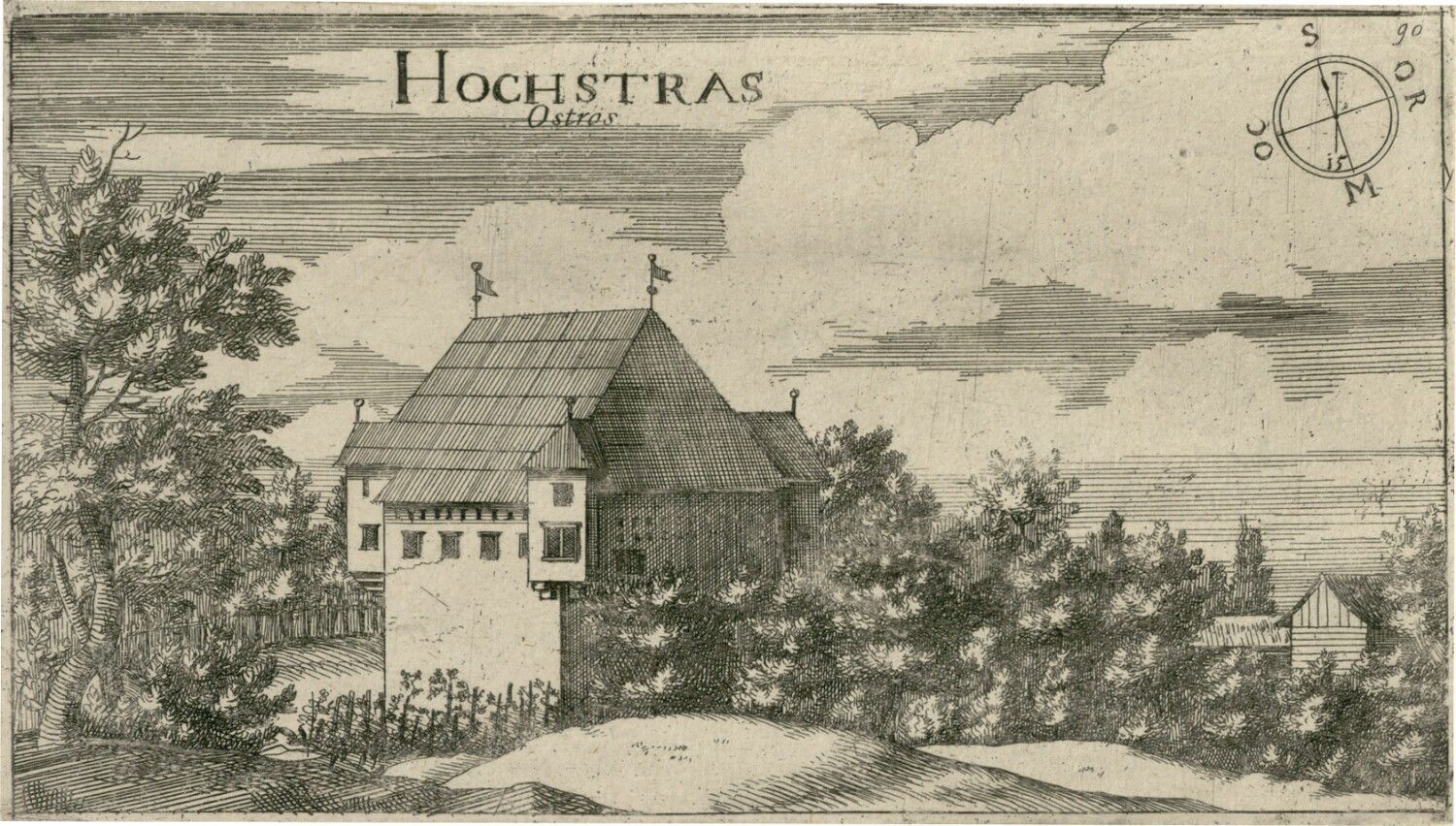 Dvorec Ostraž (Hochstras)